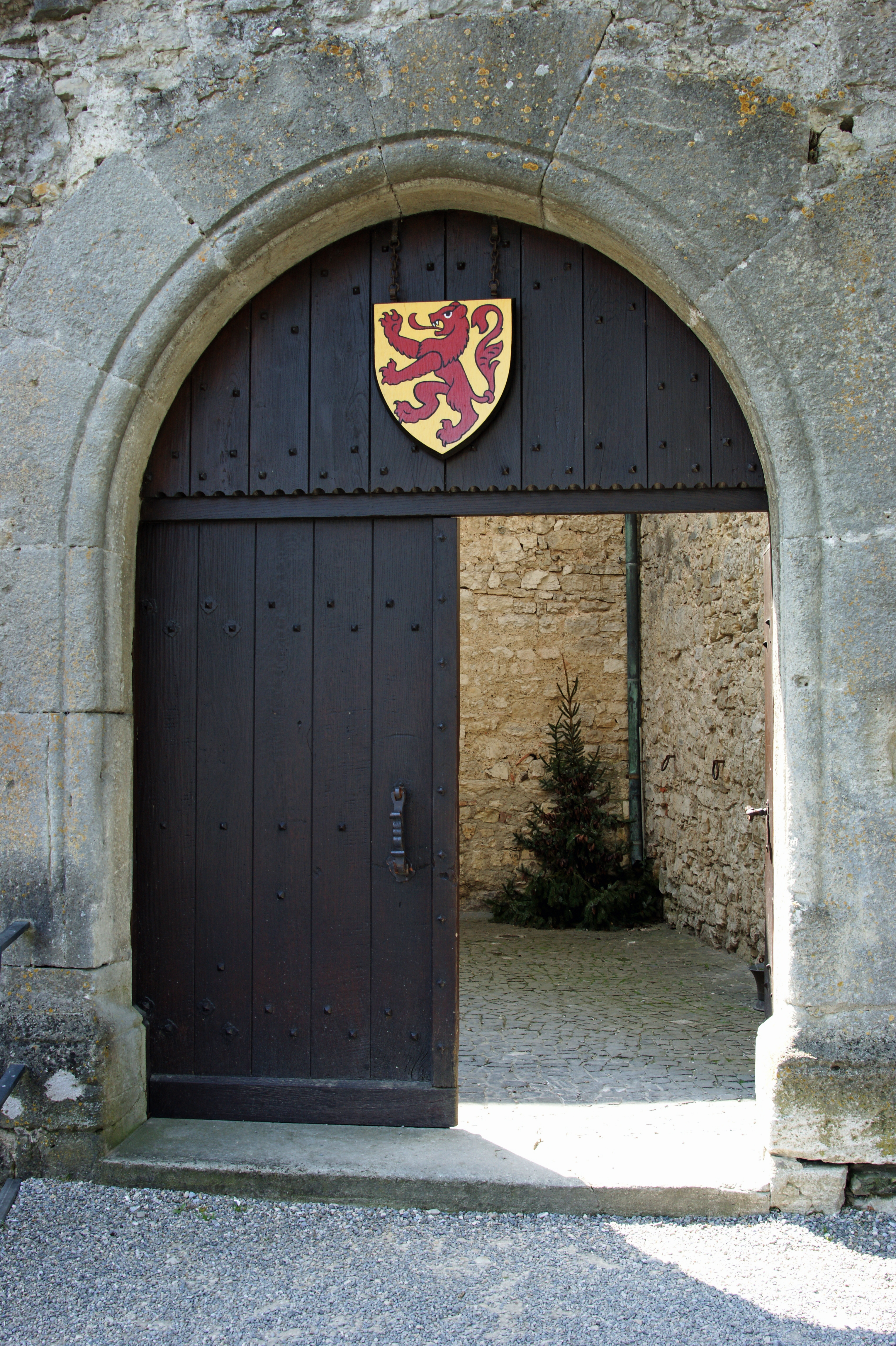 Schloss Habsburg in Kt. Aargau, Eingangstor mit Wappen